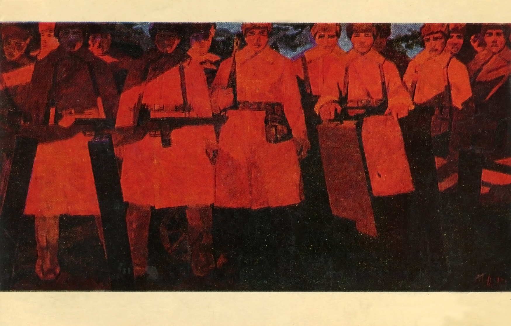 Открытка (издательство «Жазушы», 1972 год) по картине Молдабекова Айтымбая «Алмаатинцы в боях за Москву» (1971)